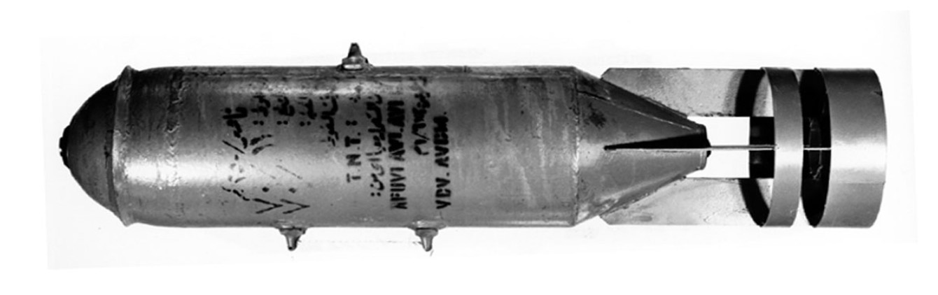 A FAB-250 M46 Bomb.